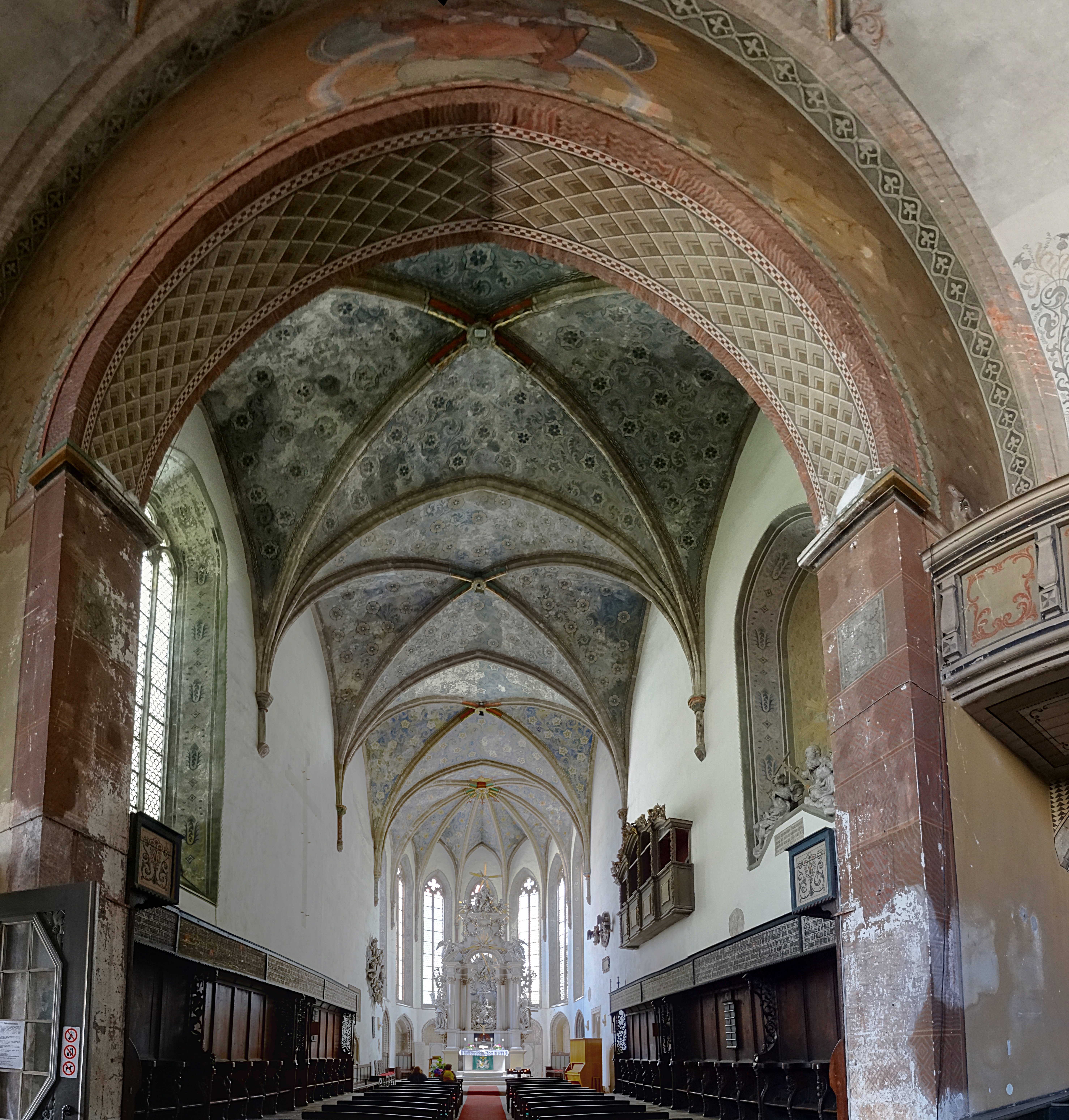 Chor der Dreifaltigkeitskirche (Görlitz), Blick nach Osten